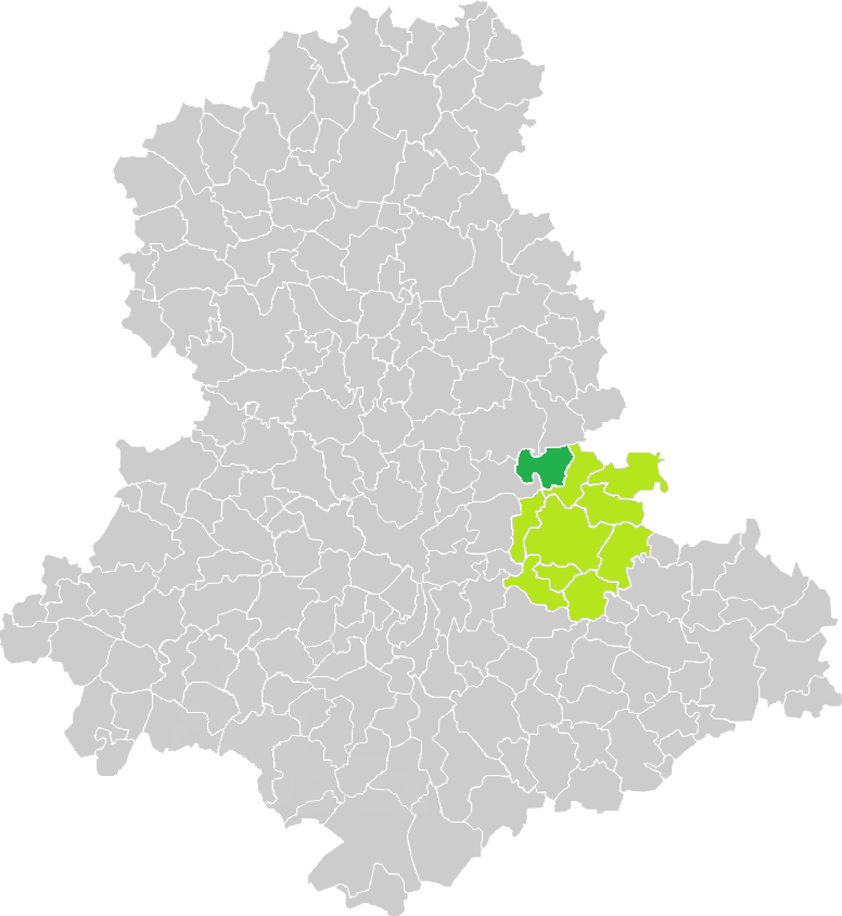 Carte de situation de la commune de Saint-Martin-Terressus (en vert foncé) dans le votre Canton (en vert clair) sur une carte des communes de la Haute-Vienne